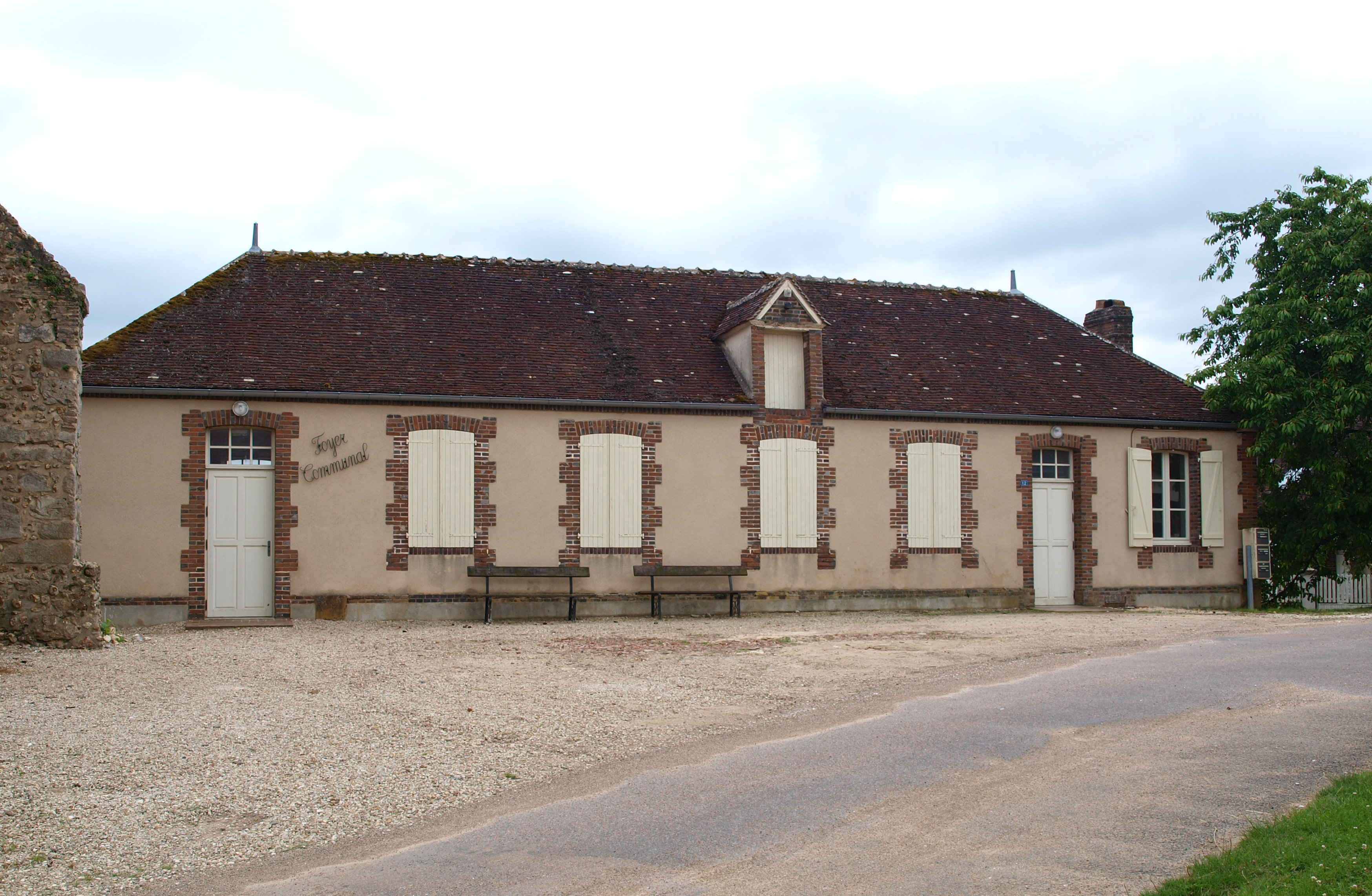 Sommecaise (Yonne, France) - le foyer communal.